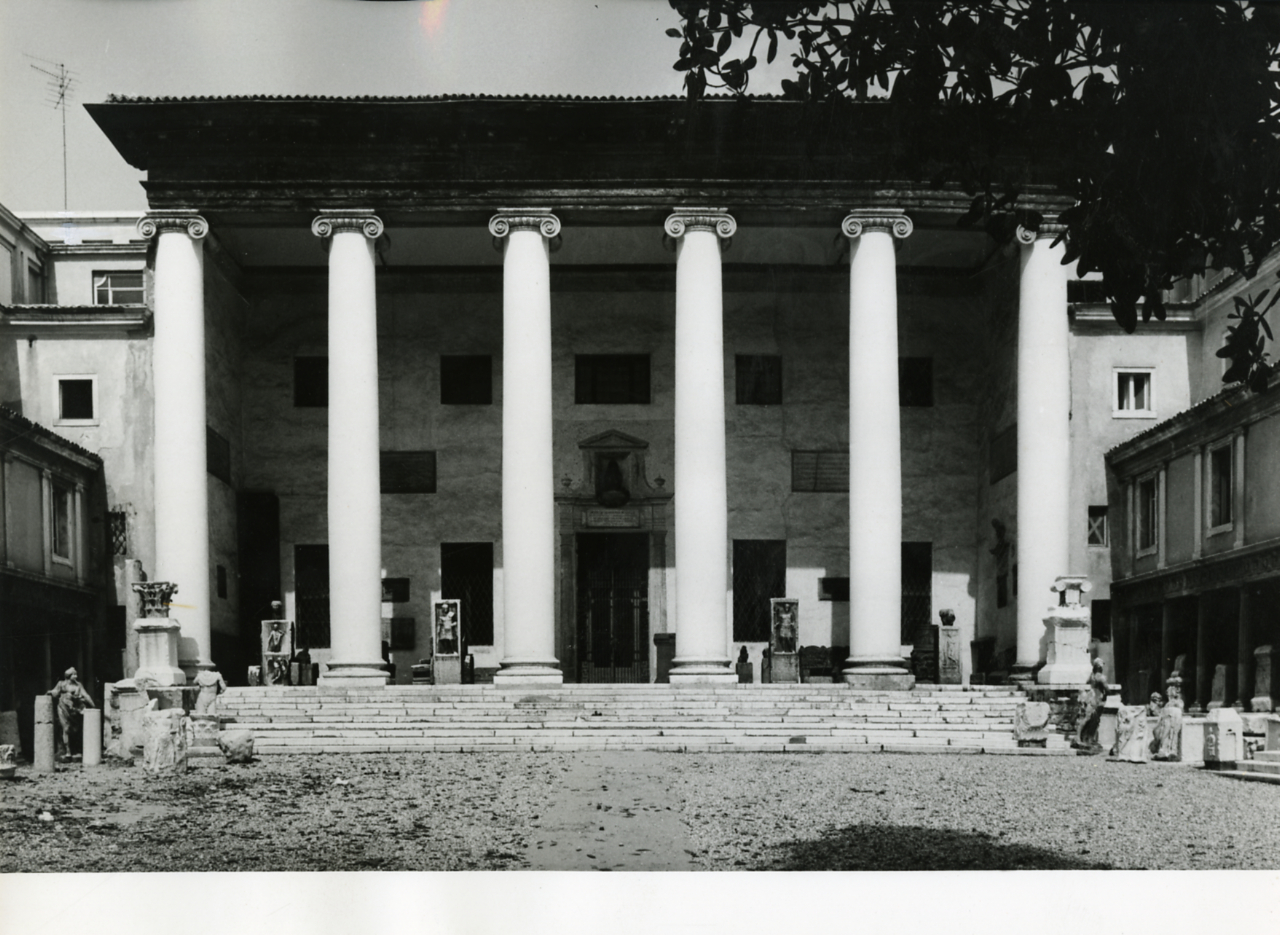 Servizio fotografico : Venezia, 1972 / Paolo Monti. - Stampe: 19 : Positivo b/n, gelatina bromuro d'argento/ carta, 24x30. - ((Al verso delle stampe manoscritti i numeri dei negativi corrispondenti (formato 35 mm) con indicazione del fotogramma: 1939-2052. - Sul coperchio della scatola iscrizione didascalica manoscritta a pennarello nero: "Città storiche (Verona)". - Occasione: Documentazione per la pubblicazione: Brugnoli Pier Paolo, "Nella bella Verona", Bologna, Cappelli, 1972. - Fonte: Quaderno di Paolo Monti: Leica 1501-3000 Controllo numerazione (1950-1978), presso Archivio Paolo Monti. - Fonte: Monografia di Brugnoli, Pier Paolo: Nella bella Verona, Bologna, Cappelli (1972). - Fonte: Fattura di Paolo Monti: IV. Commesse/ Fattura/ Fotografie per illustrazione del volume Verona (1972/12/20), presso Archivio Paolo Monti. N. 292 riprese fotografiche della città di Verona in formato 24x30